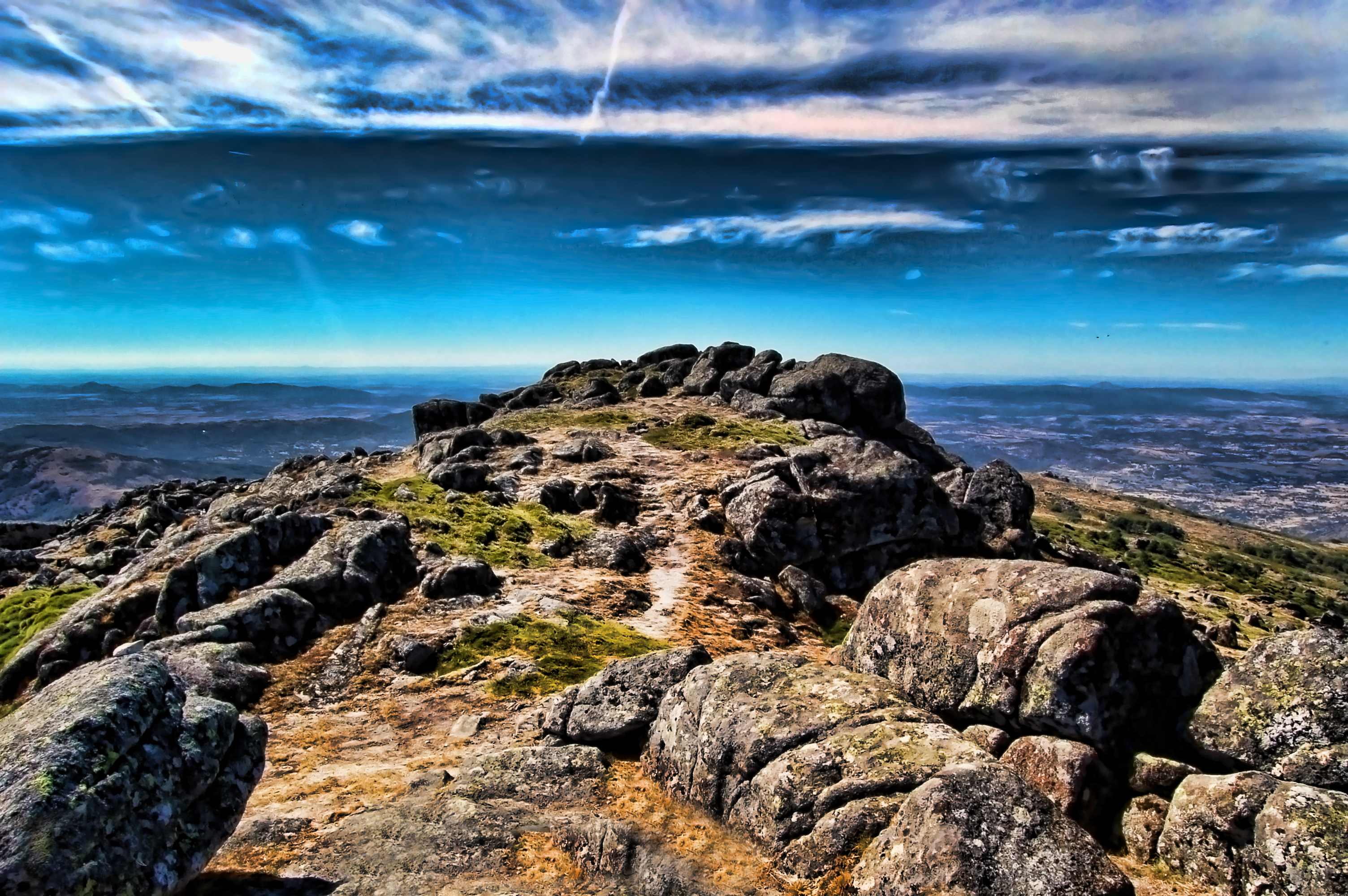 Binaca 2010